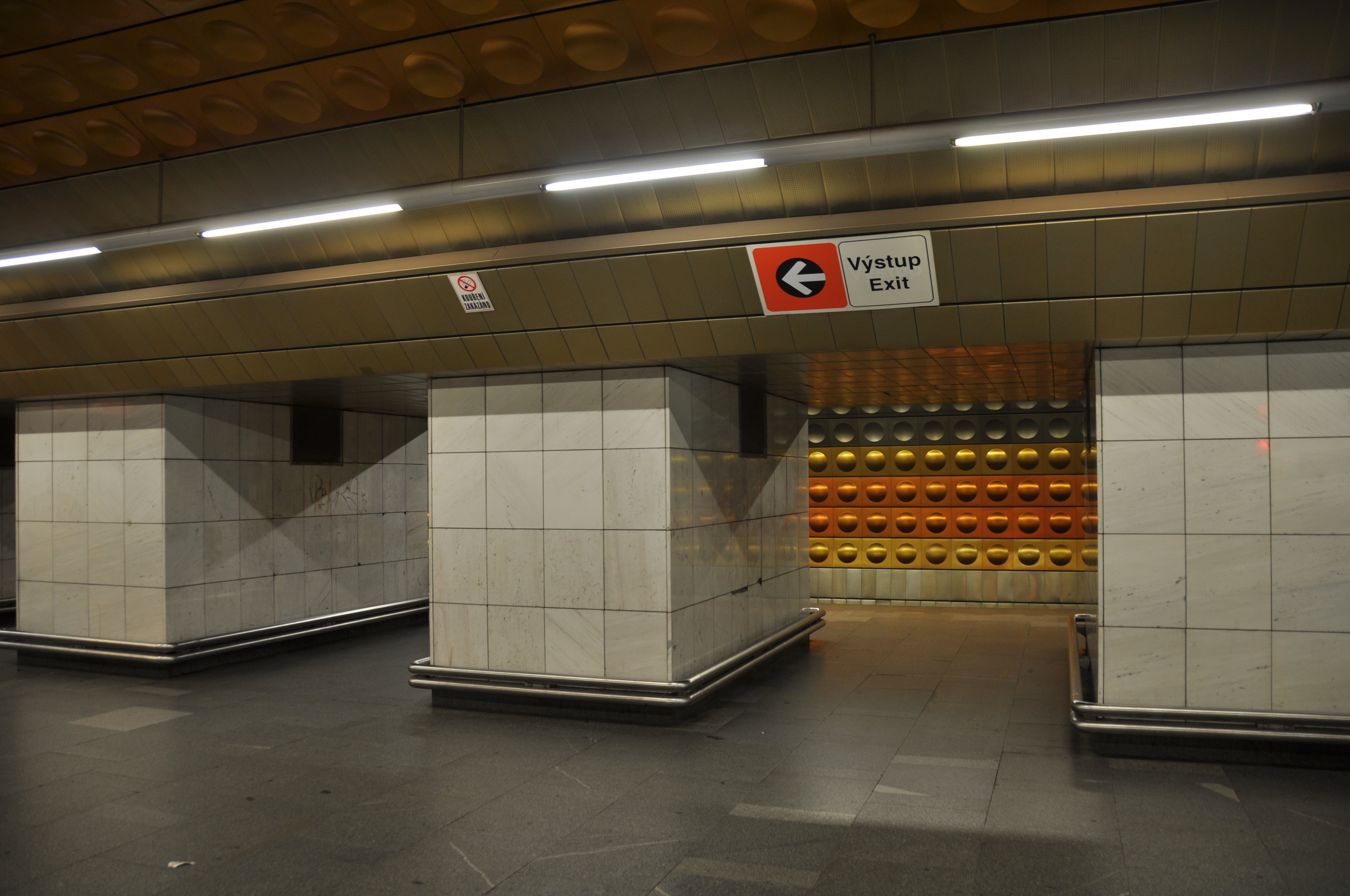 Metro Praha